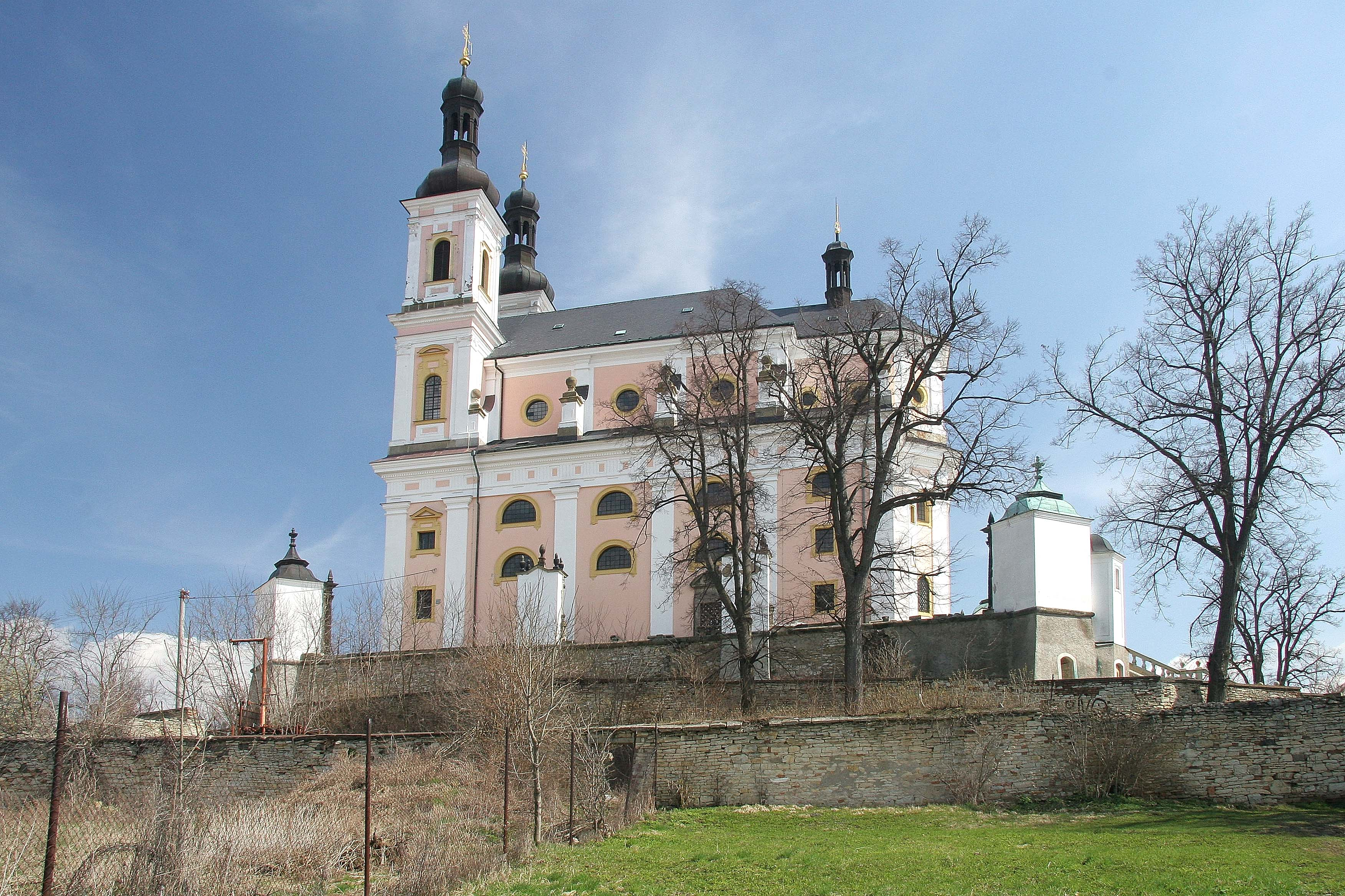 Poutní kostel Panny Marie na Chloumku v Luži, district Chrudim autor: Prazak date: 15. 4. 2006